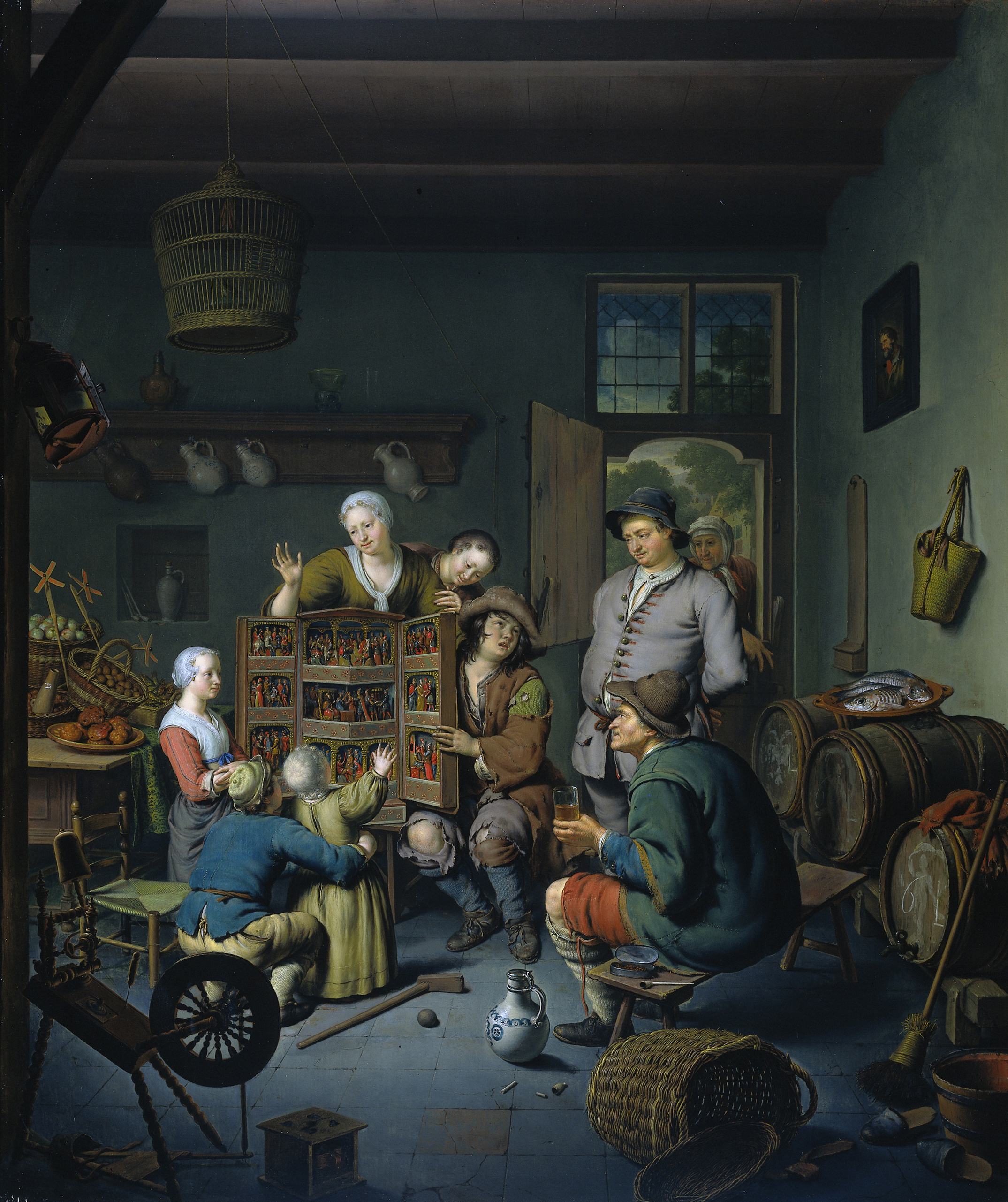 De rarekiek (door de kunstenaar ' 't Fraay Curieus' genoemd). In een interieur toont een rondtrekkende Savooiaard een kijkkast ten overstaan van een familie met kinderen. In de rarekiek zijn scènes voorgesteld, wellicht uit een ridder- of andere populaire roman. De kamer staat vol huisraad: een spinnewiel, manden met fruit, speelgoedmolentjes, een mand, sloffen en een emmer met een bezem. Tegen de rechterwand staat een rij vaten waarop iemand een bord met vis heeft neergezet. Aan de rechtermuur een schilderij, tegen de achterwand een rek met kruiken. Aan het plafond hangt een vogelkooi.; Willem van Mieris (1662-1747), olieverf op paneel, 1718